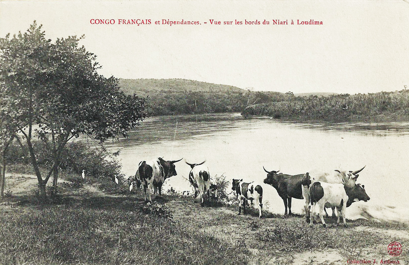 Vue sur les bords du Niari à Loudima. Collection J. Audema. Phot. A.B. & Cie, Nancy [Albert Bergeret] Congo Français